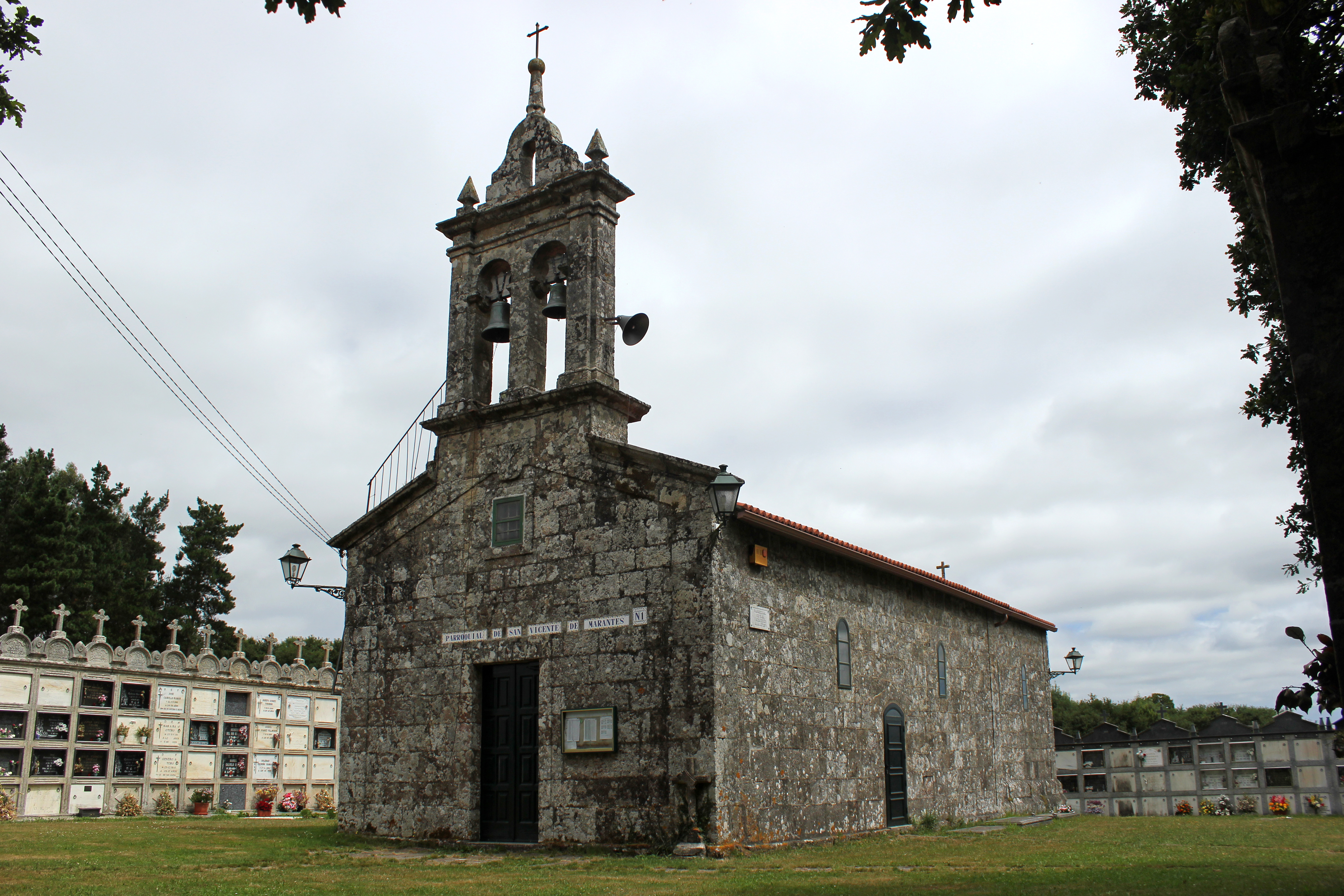 Igrexa de Marantes, Santiago de Compostela.